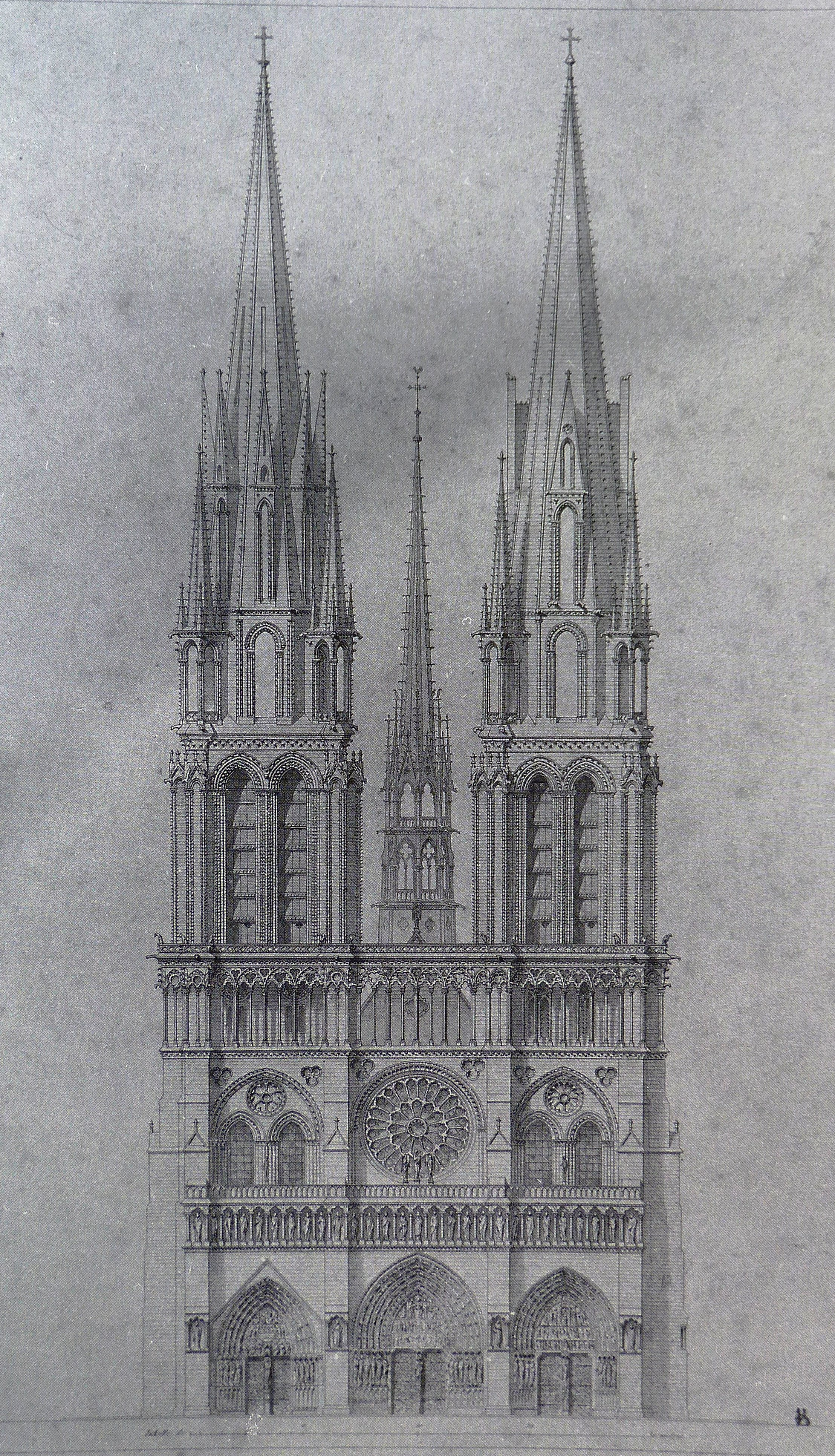 Notre-Dame de Paris, projet de flèches par Viollet-le-Duc - Bibliothèque nationale, Cabinet des Estampes